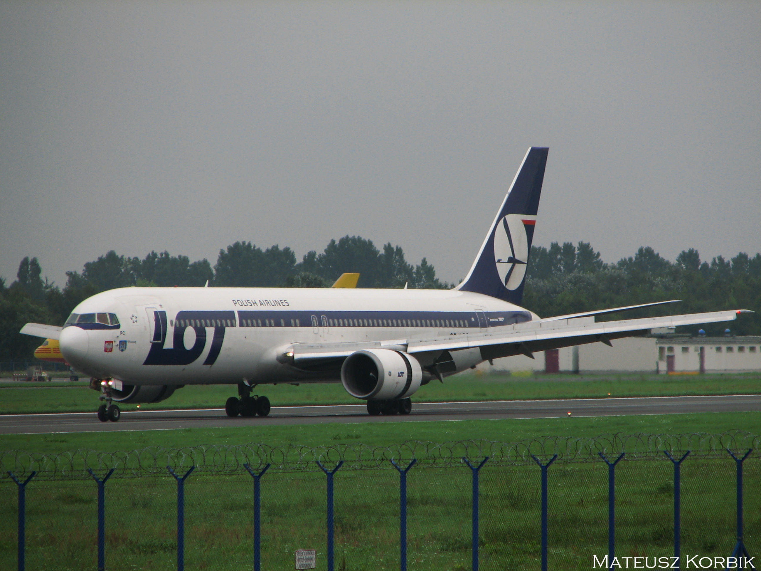 August 1st 2011